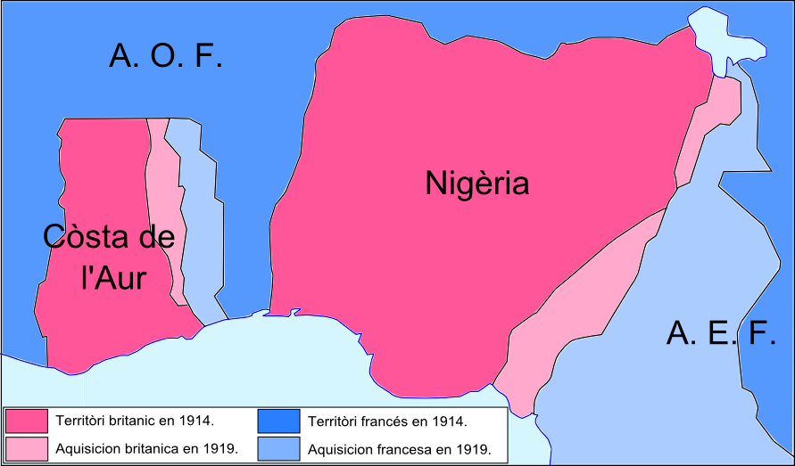 Partiment dei colonias alemandas dau Golf de Guinèa après la Premiera Guèrra Mondiala.